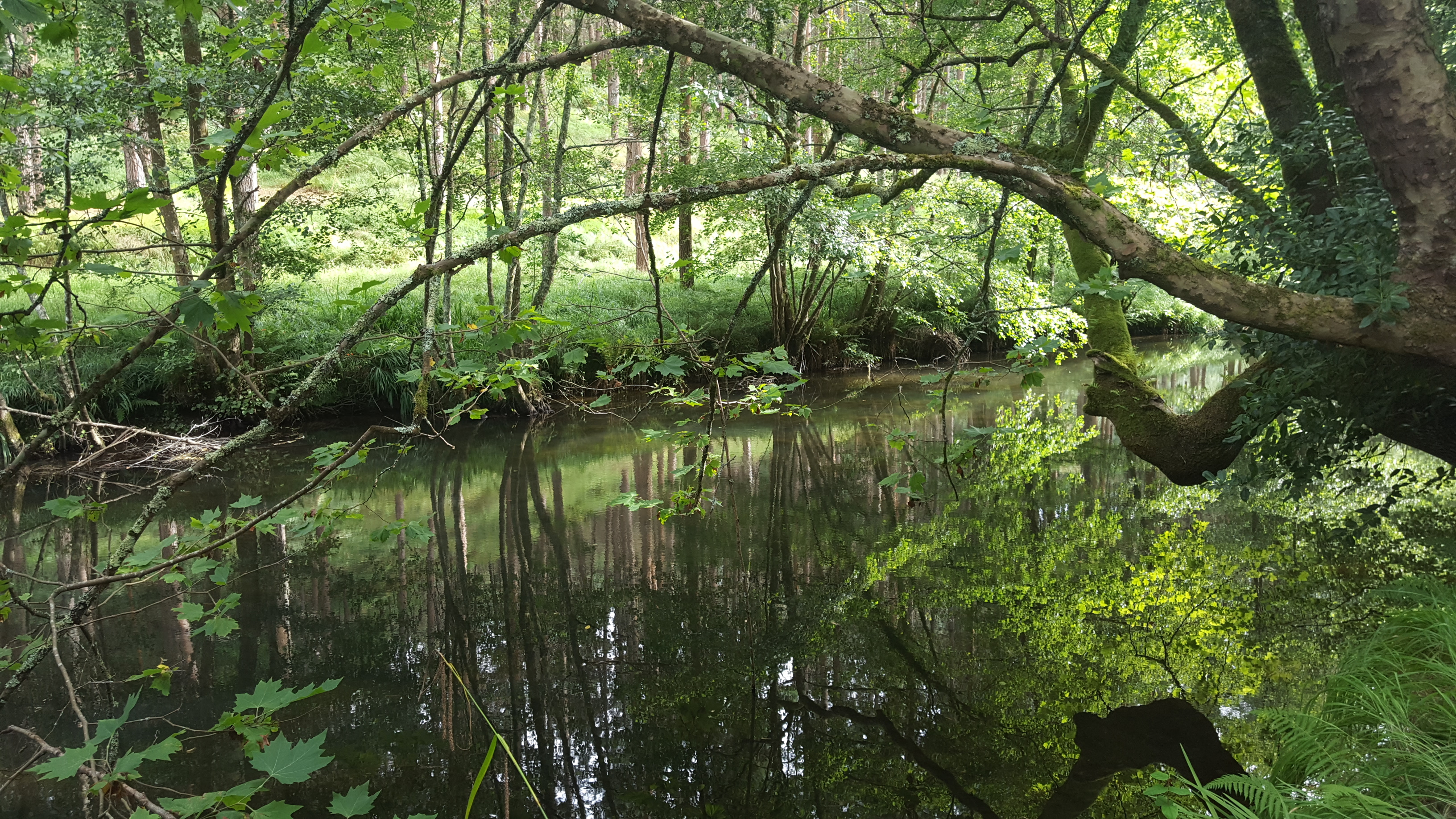 Lea ibaia.